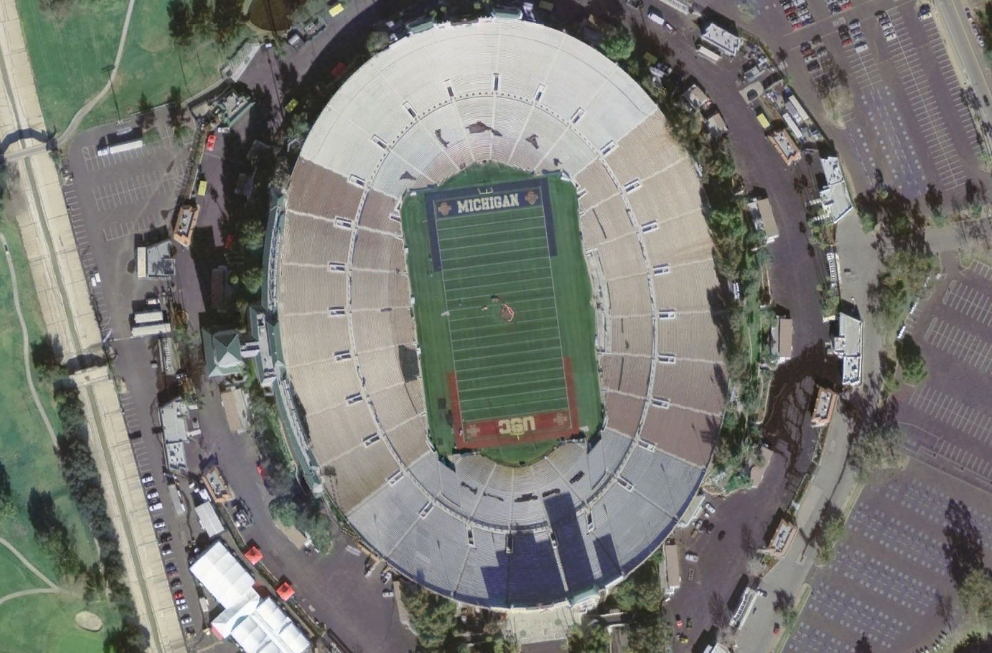 Image satellite du Rose Bowl de Pasadena, Ca. Image satellite USGS provenant de Nasa World Wind